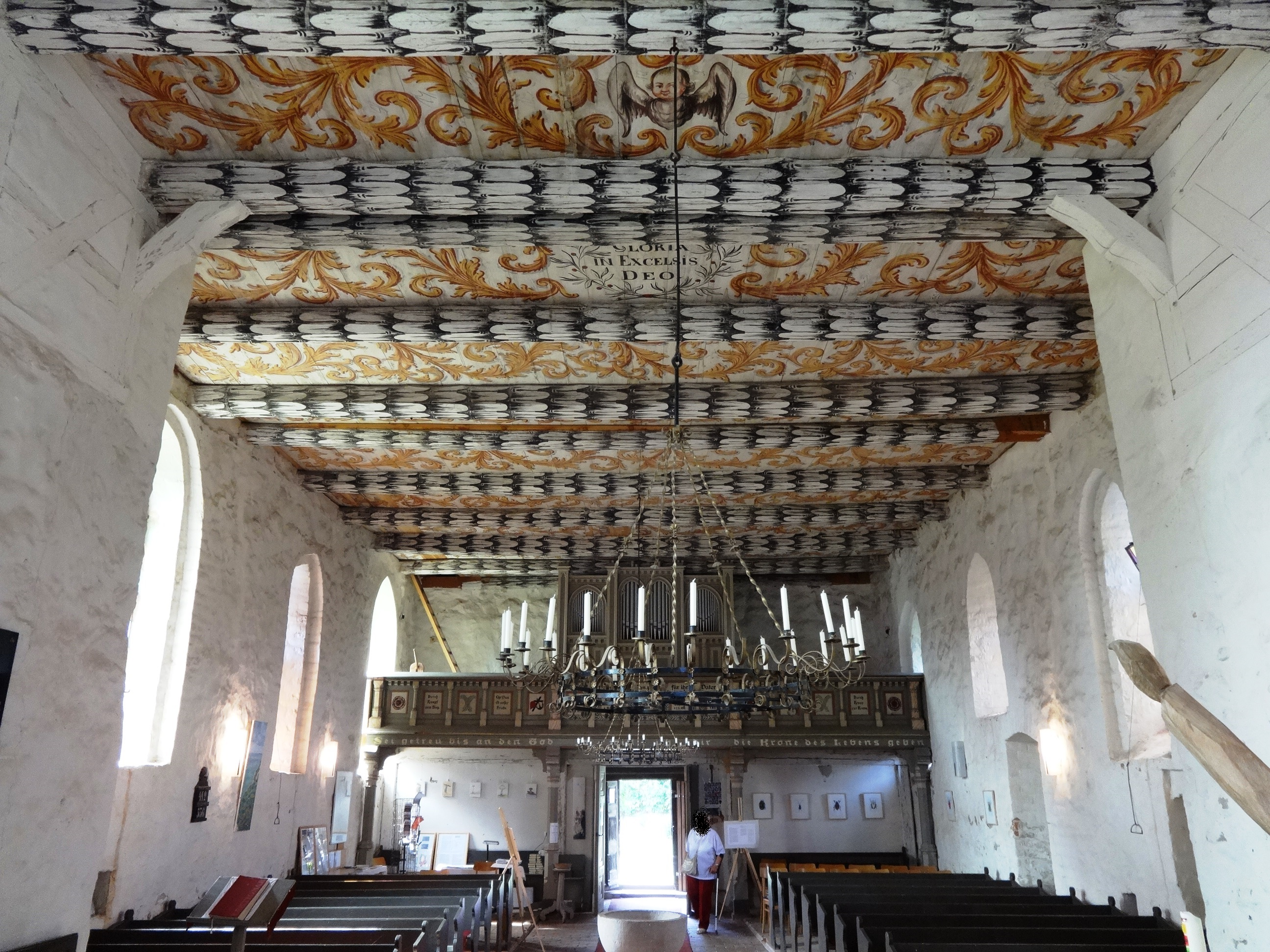 St. Nikolai zu Bauer, eine Feldsteinkirche aus dem 13. Jahrhundert in Wehrland, ein Ortsteil der Gemeinde Zemitz, Landkreis Vorpommern-Greifswald